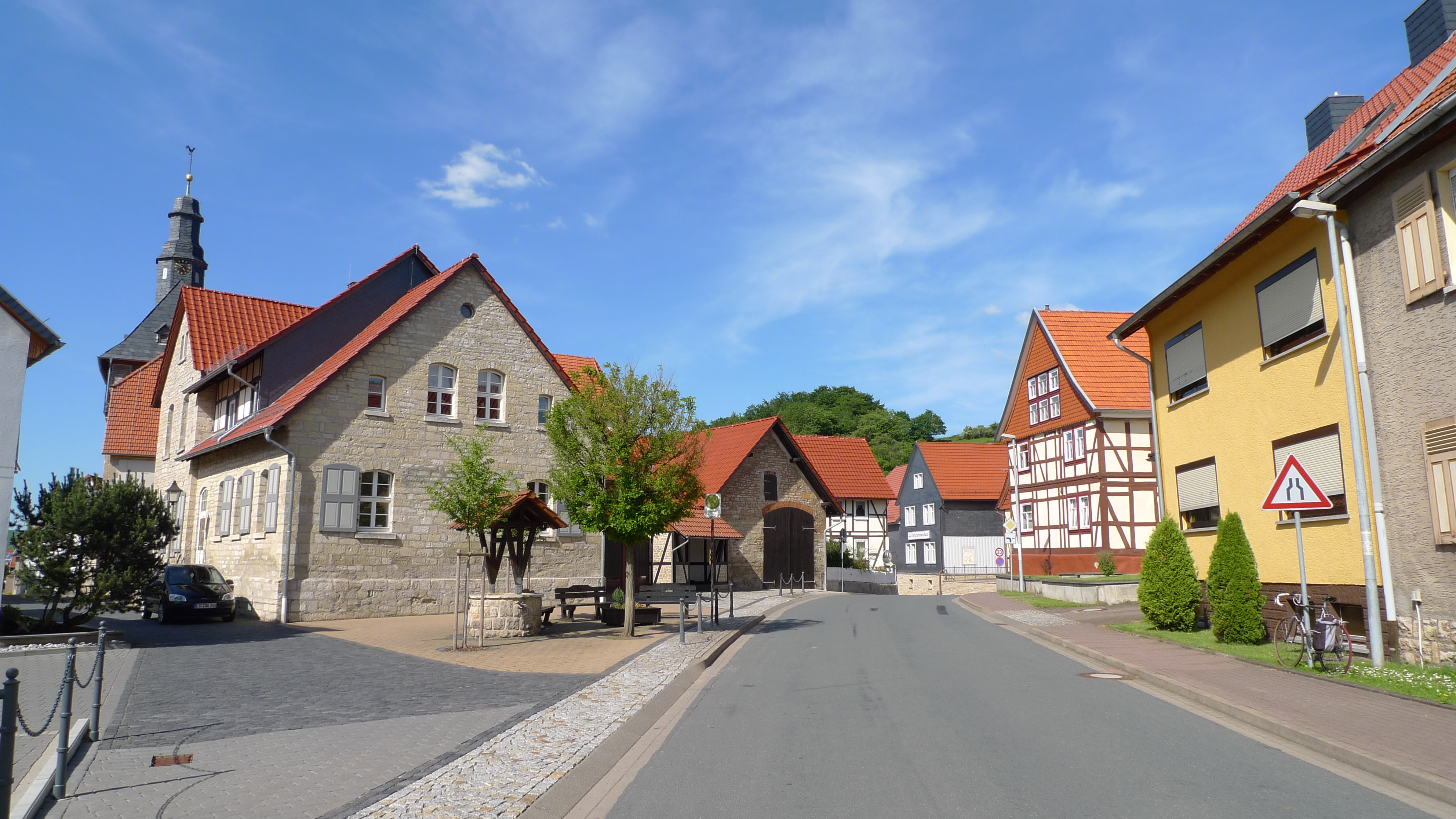 Ortszentrum von Jützenbach im Eichsfeld